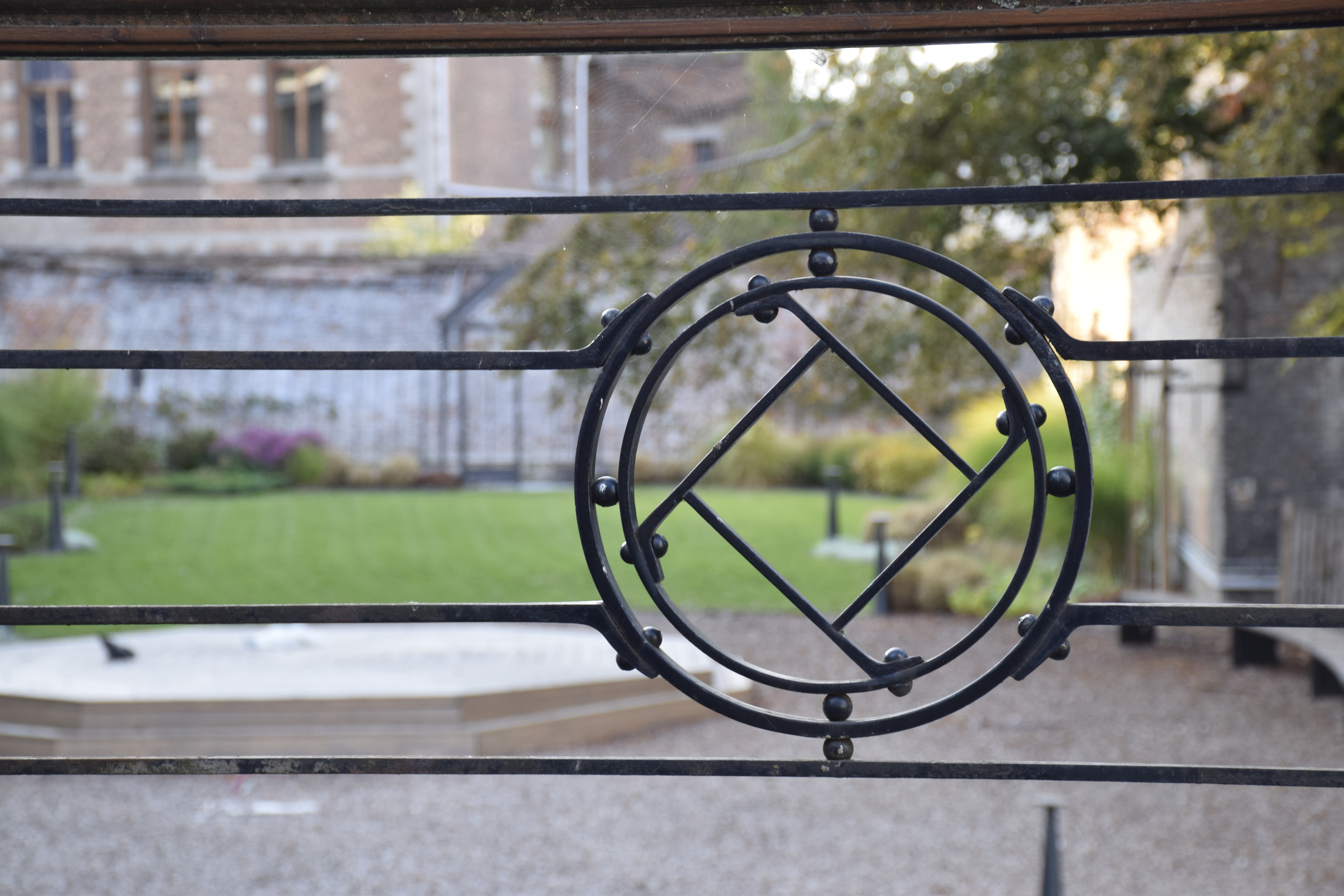 Maison Léon Losseau: motif géométrique de la balustrade du balcon donnant sur le jardin